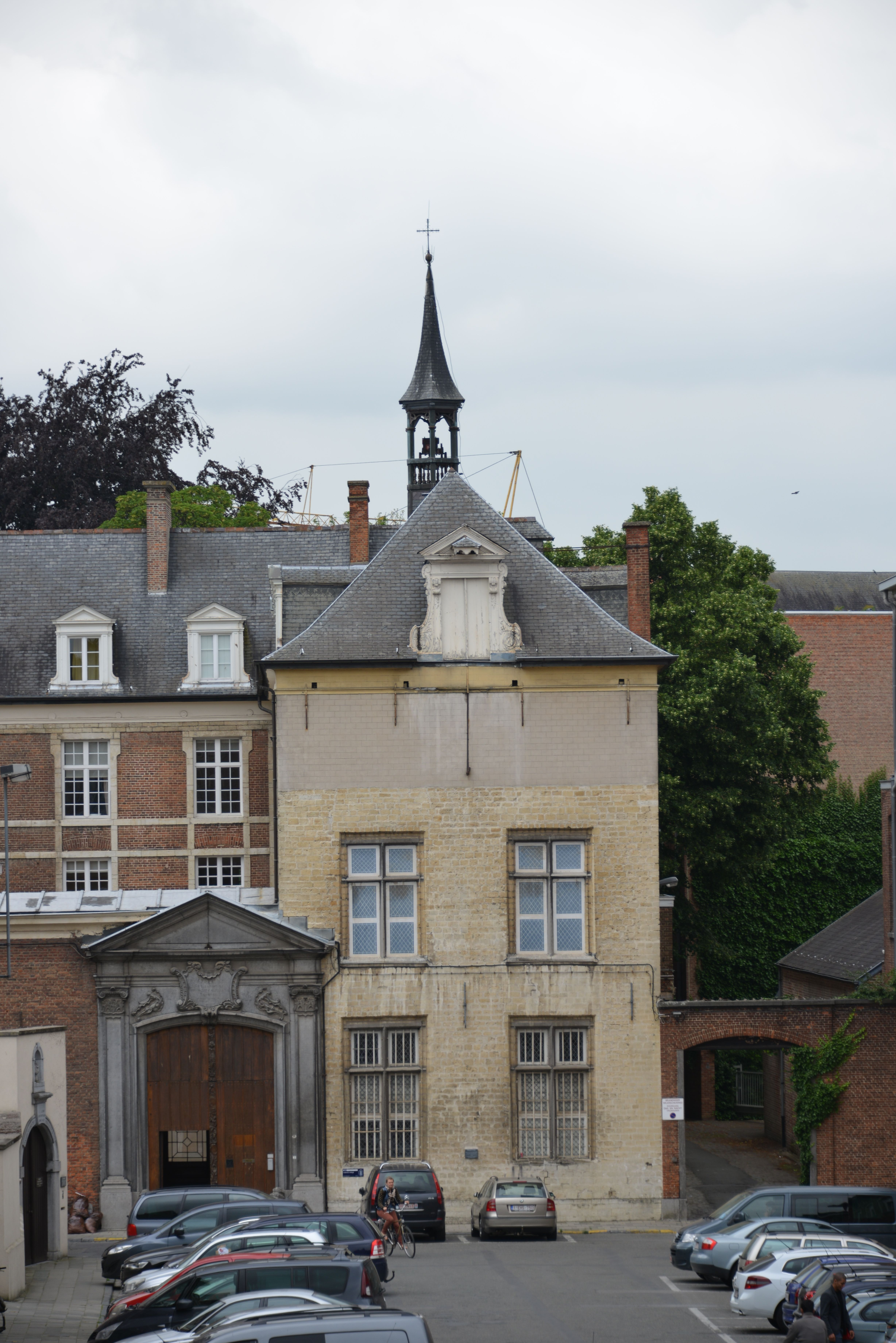 Leuven, Belgium